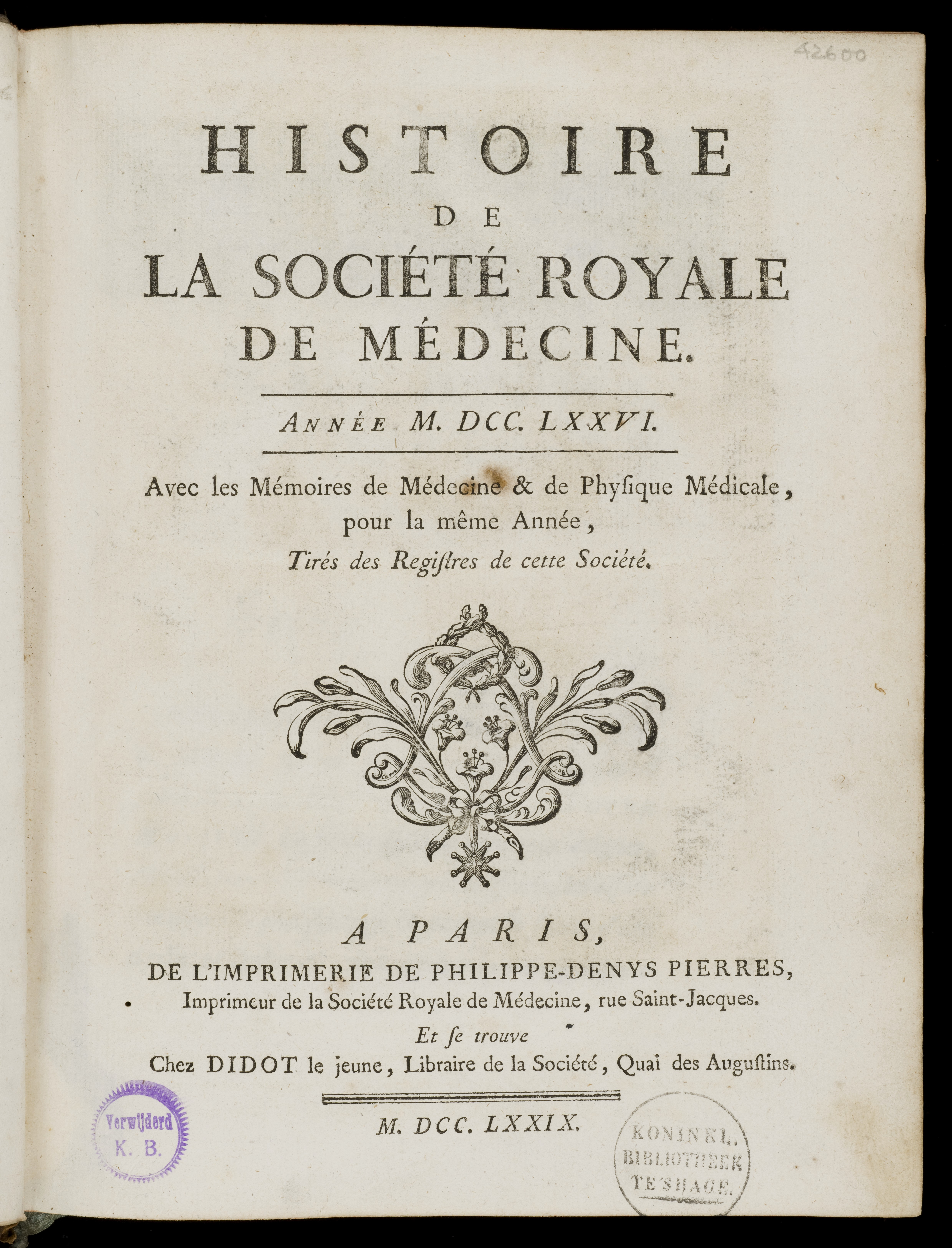 Frontispiece to 'Histoire de la Societe Royale de Medecine' Rare Books